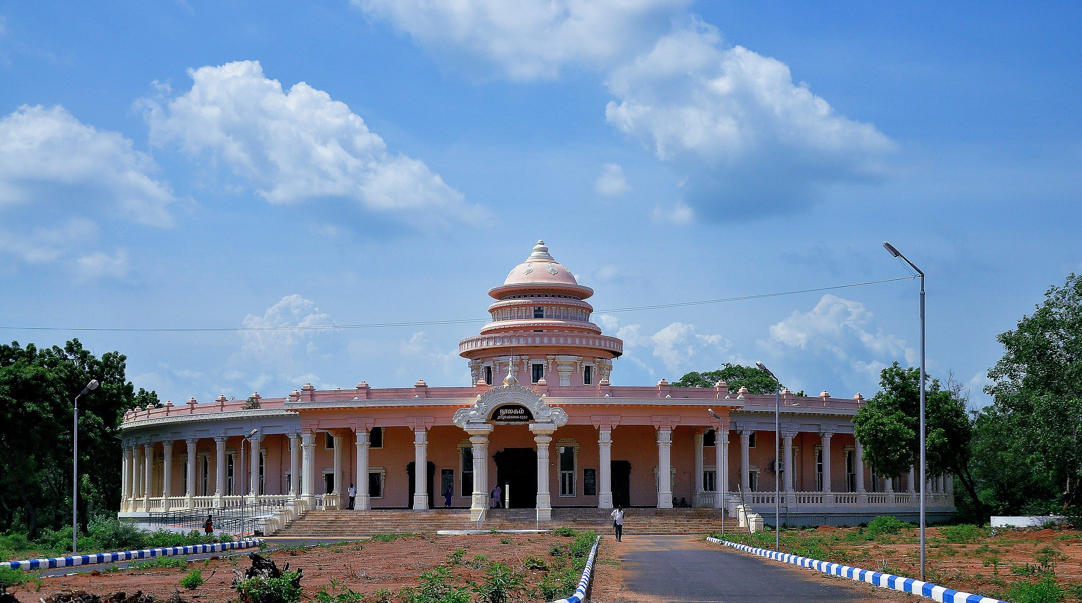 തമിഴ് സർവകലാശാലയുടെ ലൈബ്രറി കെട്ടിടം